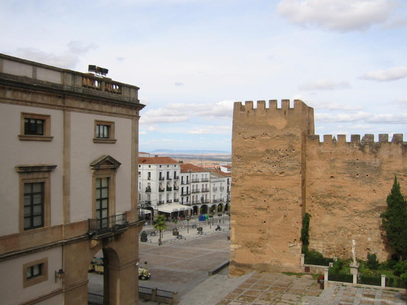 Cáceres Blick auf die Plaza Mayor